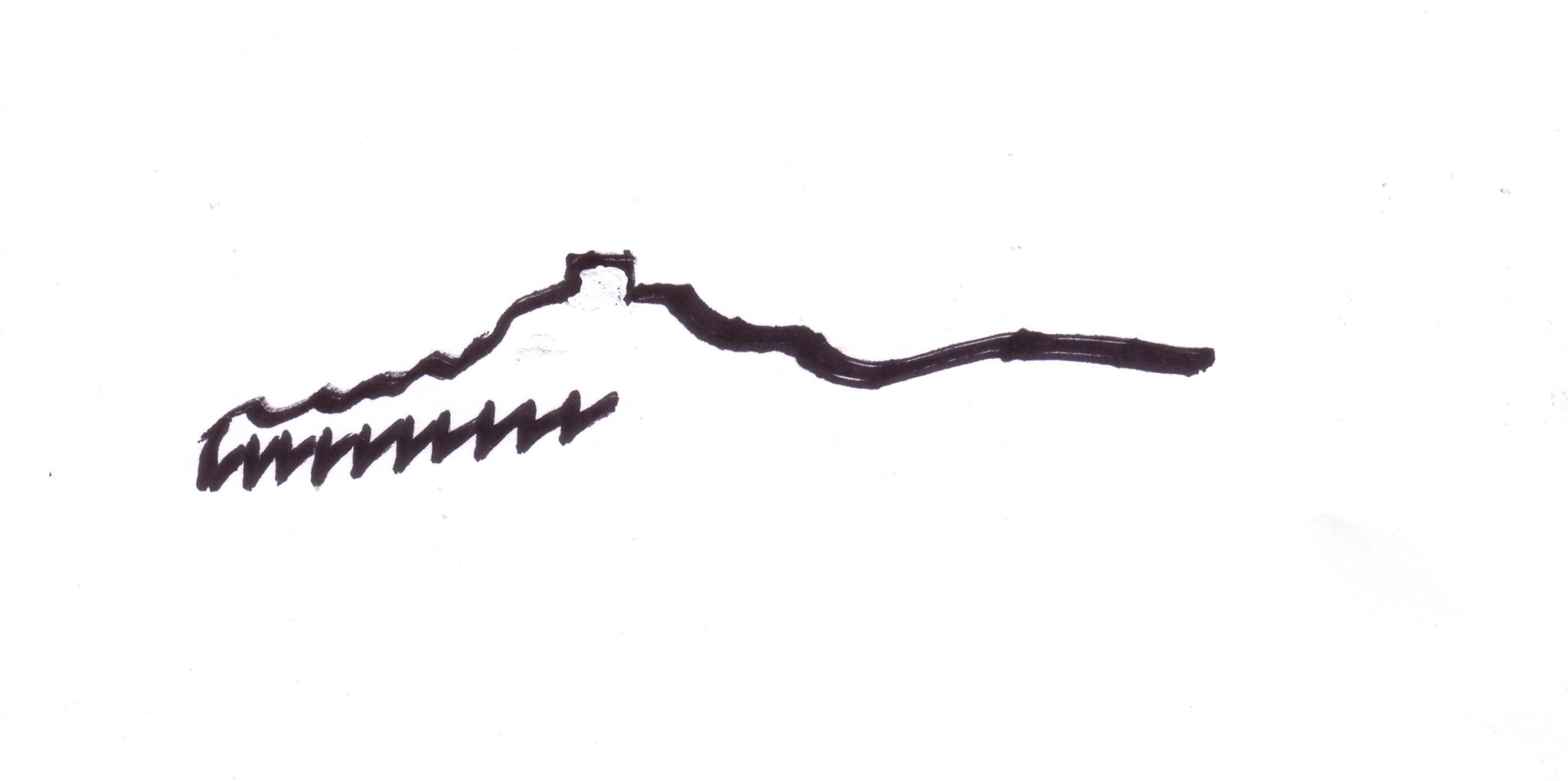 bildon de la kongreso